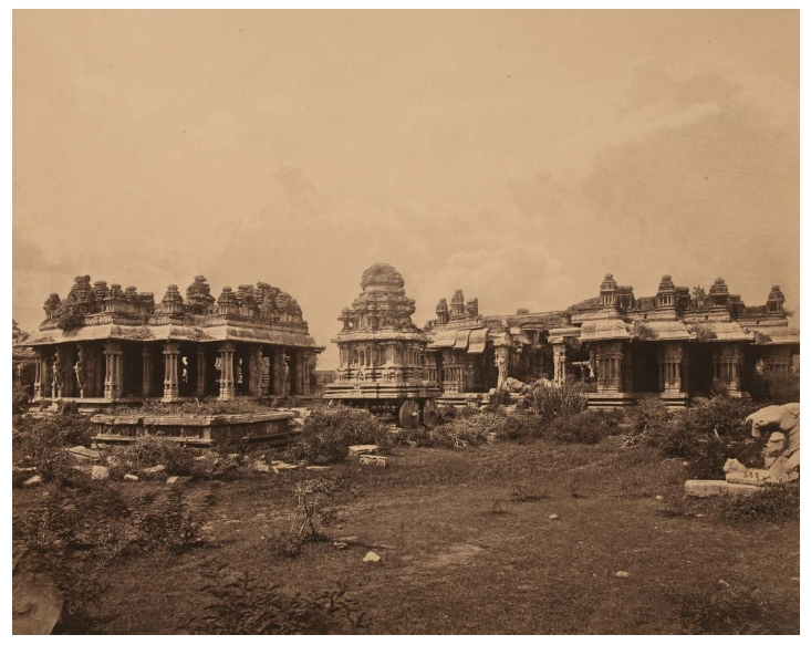 Hampi in 1868, Karnataka